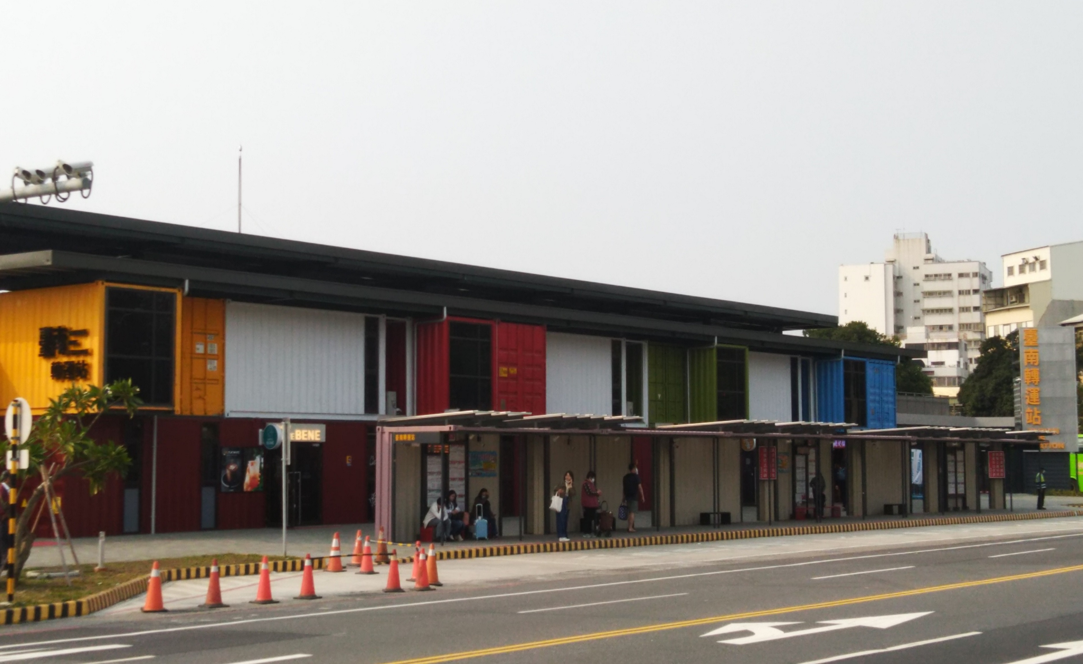 臺南轉運站，位於臺南市公園路上，多家國道客運進駐此站，外頭亦有市公車停靠載客